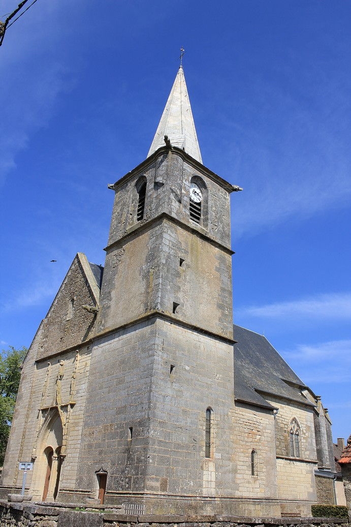 Eglise Saint Franchy d'Amazy